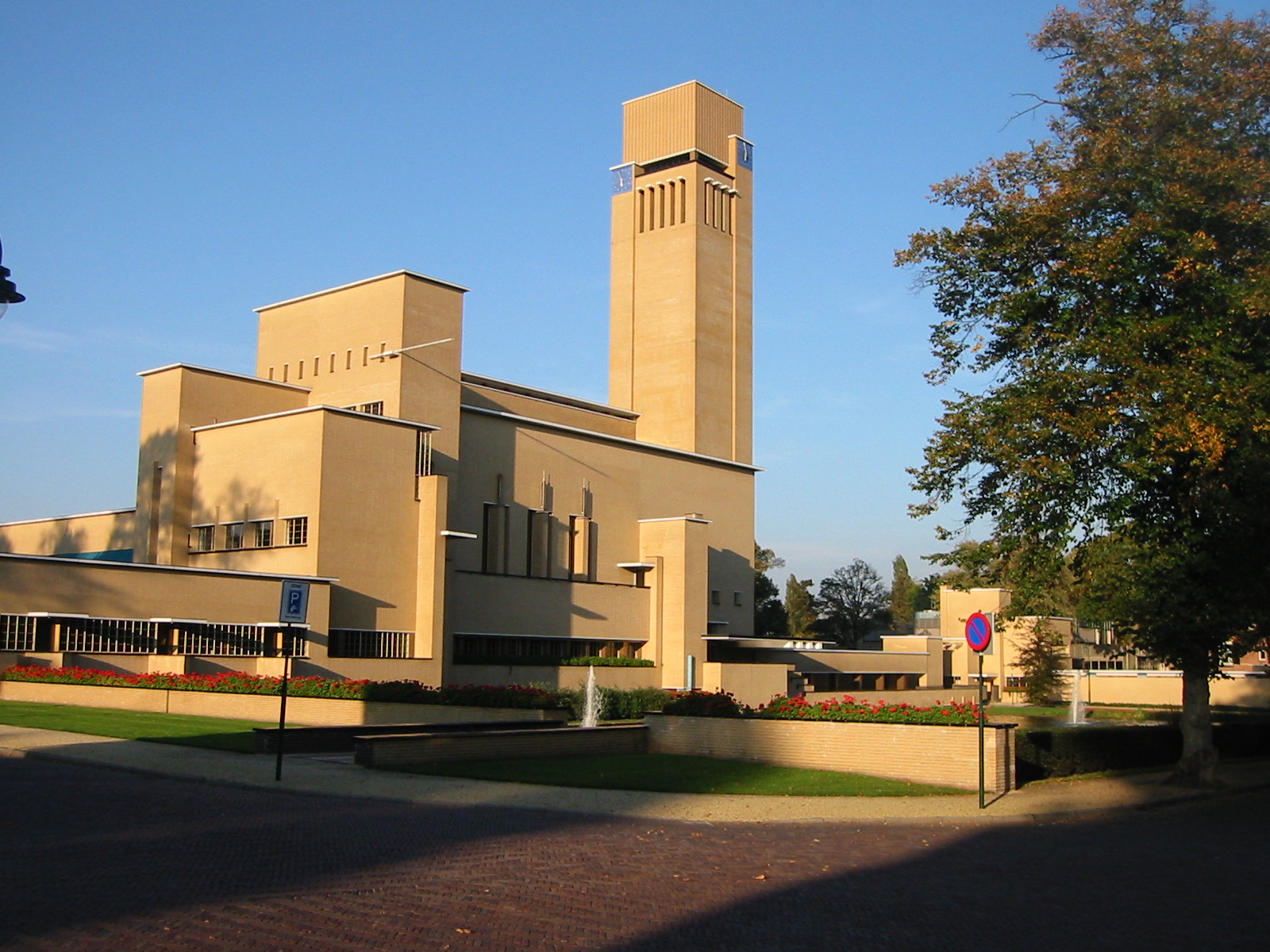 Maison communale d’Hilversum